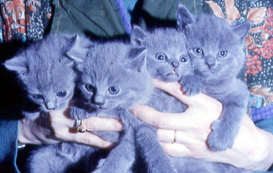 chatons Chartreux de l'ancien élevage de la Walkyrie